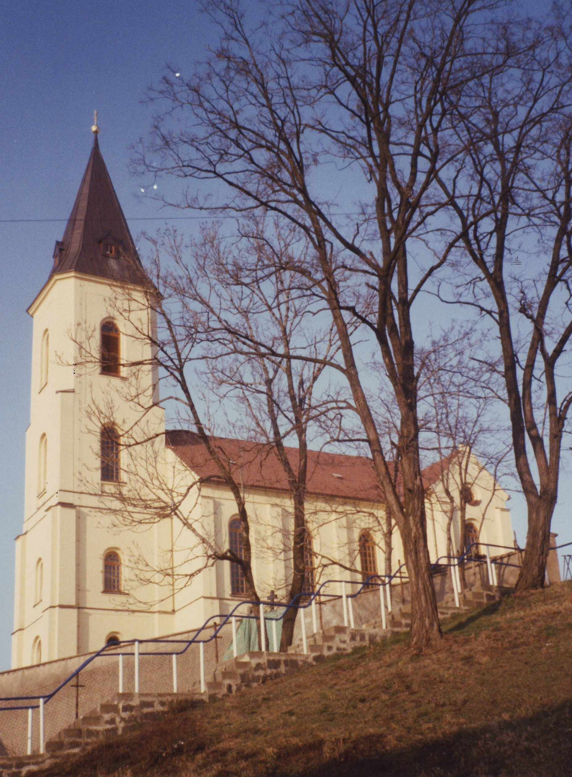 Evangelische Kirche von Zschochau (Ortsteil der Gemeinde Ostrau, Sachsen)